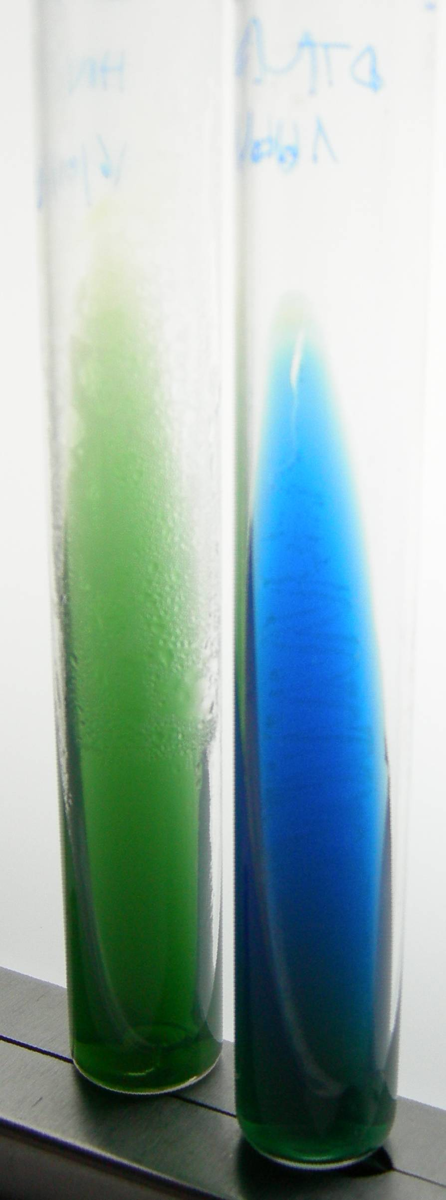 Photographie de deux milieux de Citrate de Simmons, à gauche (vert) milieu sans culture après ensemencement et à droite, milieu (bleu) avec culture et alcalinisation. Photographie réalisée au Lycée Paul Éluard de Saint Denis (93 France)